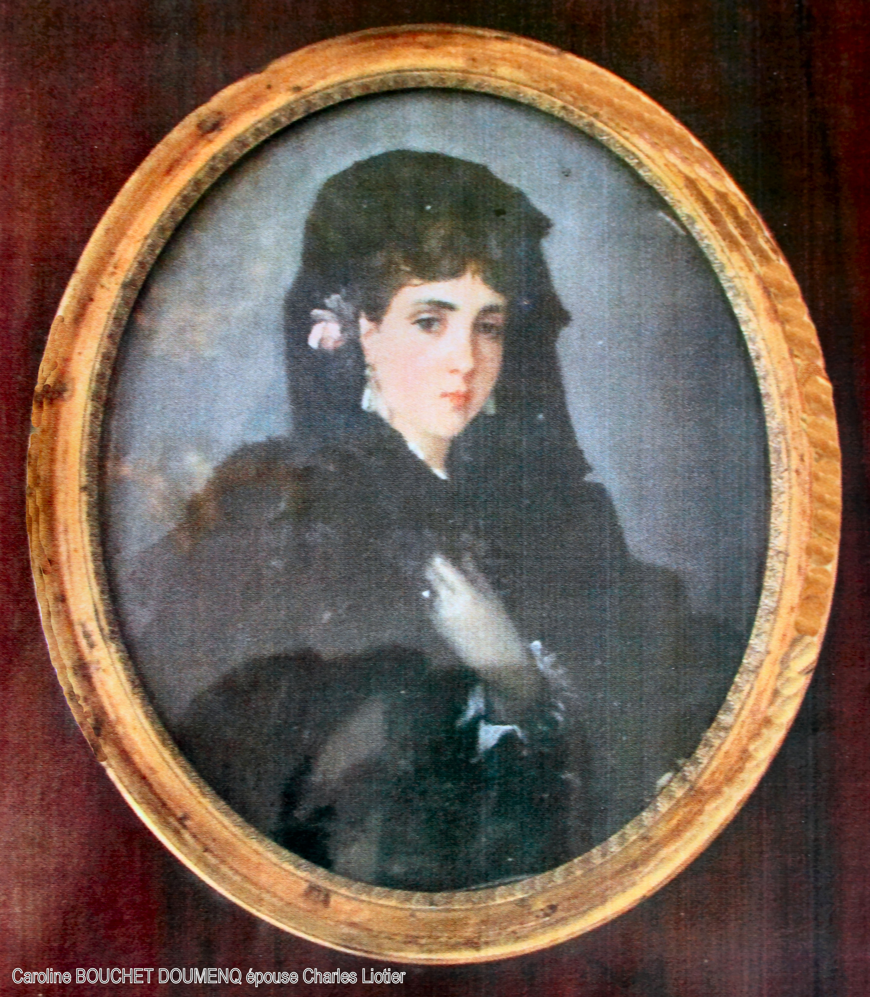 Portrait de Caroline Bouchet-Doumenq épouse Liotier par son frère Henri Bouchet-Doumenq